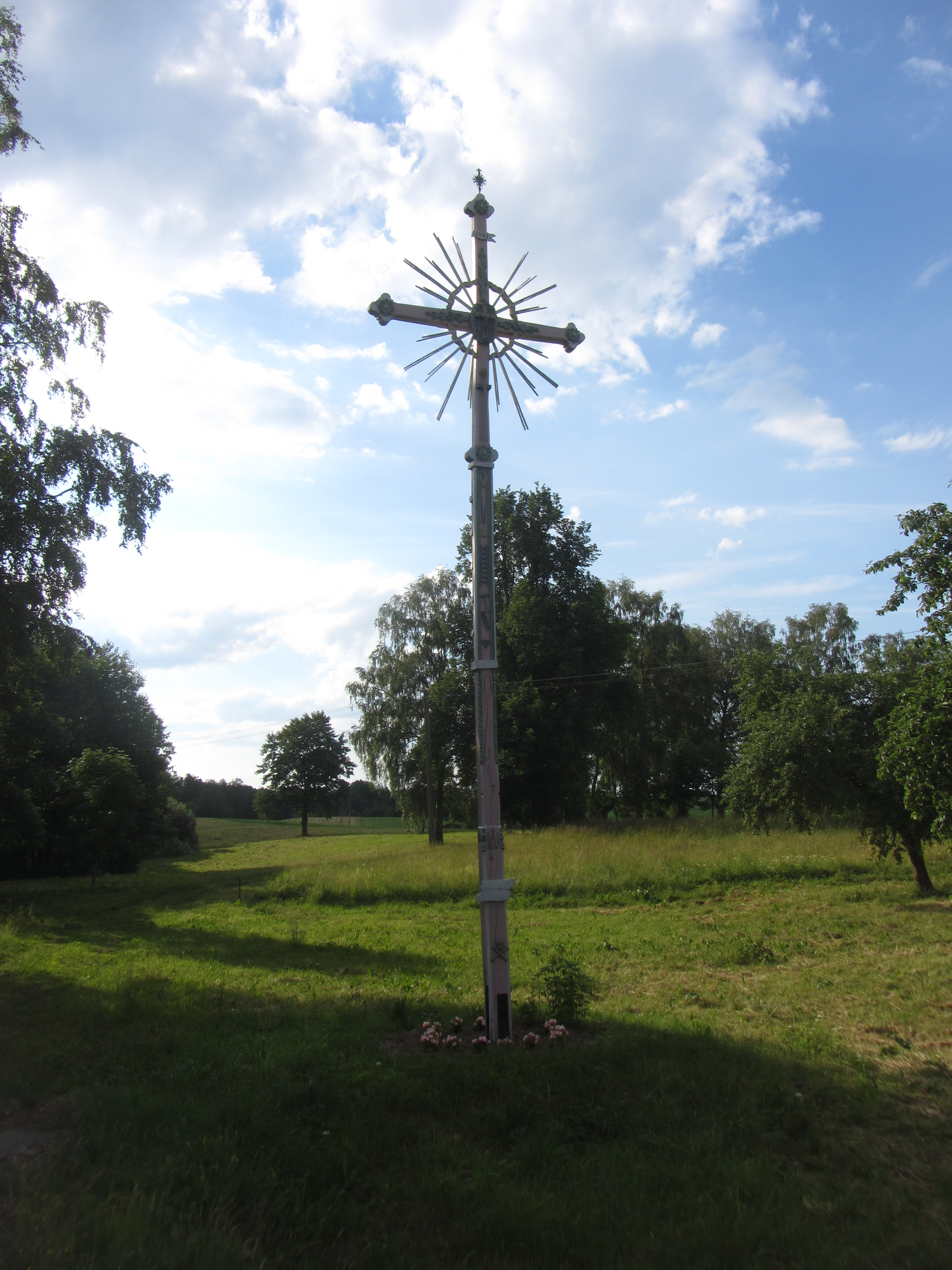 Kedonys, Lithuania